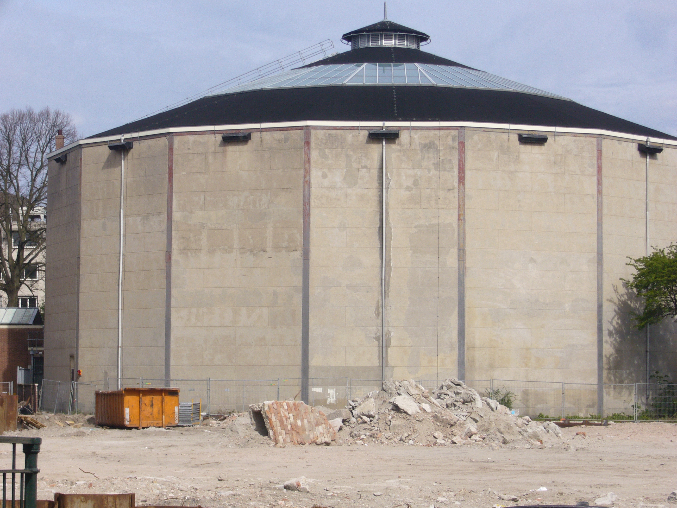 Panorama Mesdag in Den Haag, de buitenkant is nooit te zien, maar Zwembad Mauritskade is in 2007 afgebroken, nu is tijdelijk de zuidkant van het museum vanaf de Mauritskade te zien.